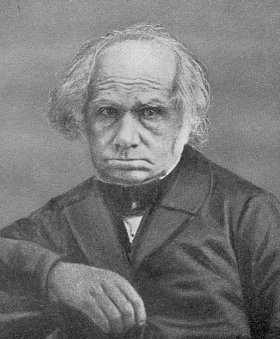 Immanuel Bekker (1785–1871), deutscher klassischer Philologe. Fotografie eines Original-Daguerrotyps der Firma Friedrich Haack, Jena aus dem Besitz von Hermann Schöne.